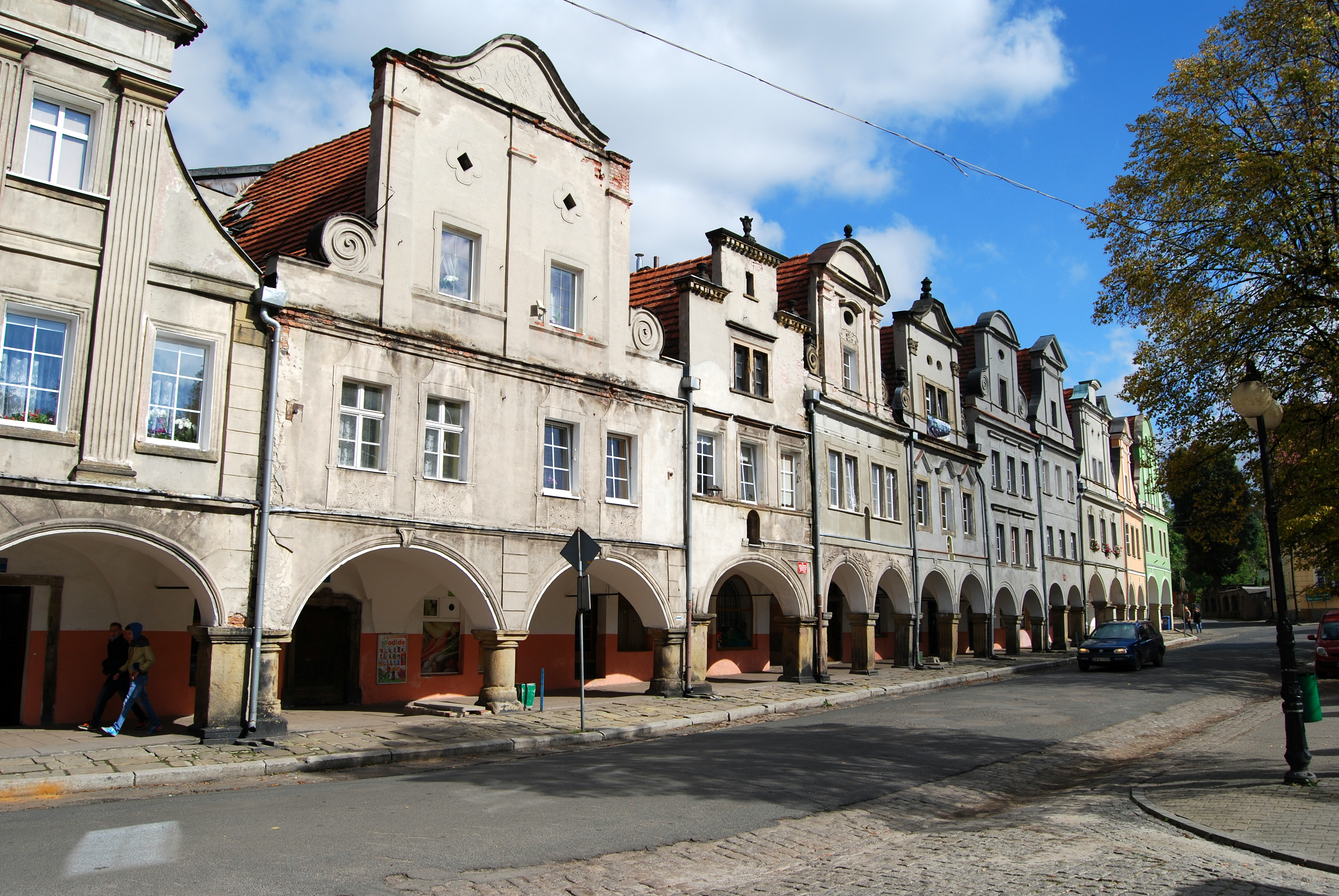 Chełmsko Śląskie, północna pierzeja Rynku